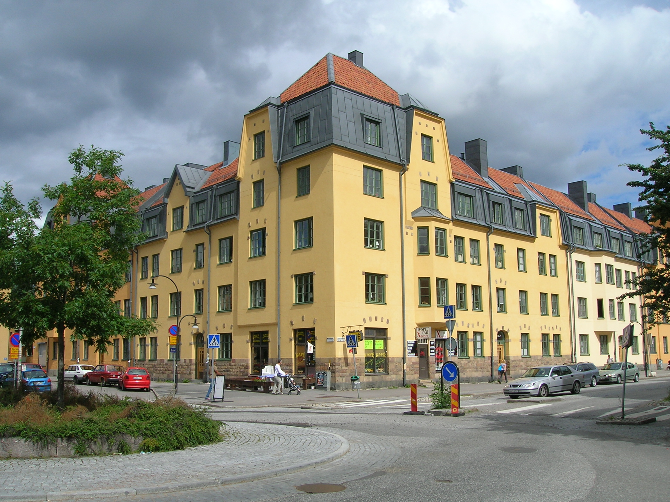 Manhemsgatan 4-6, Hägerstensvägen 138-142, built around 1910-1920, Aspudden, Stockholm.